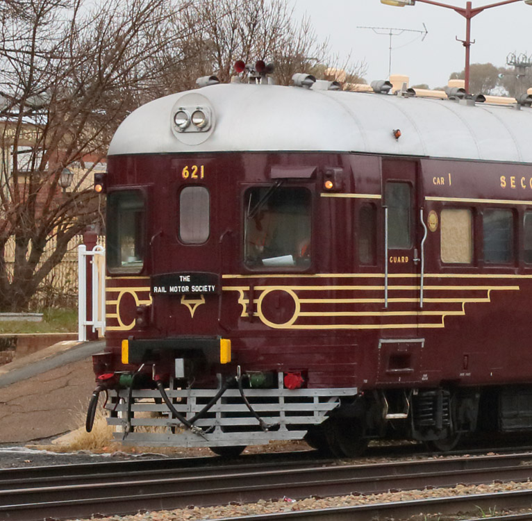 Dieselmotorvagnen 621 med namnskylt The Rail Motor Society.